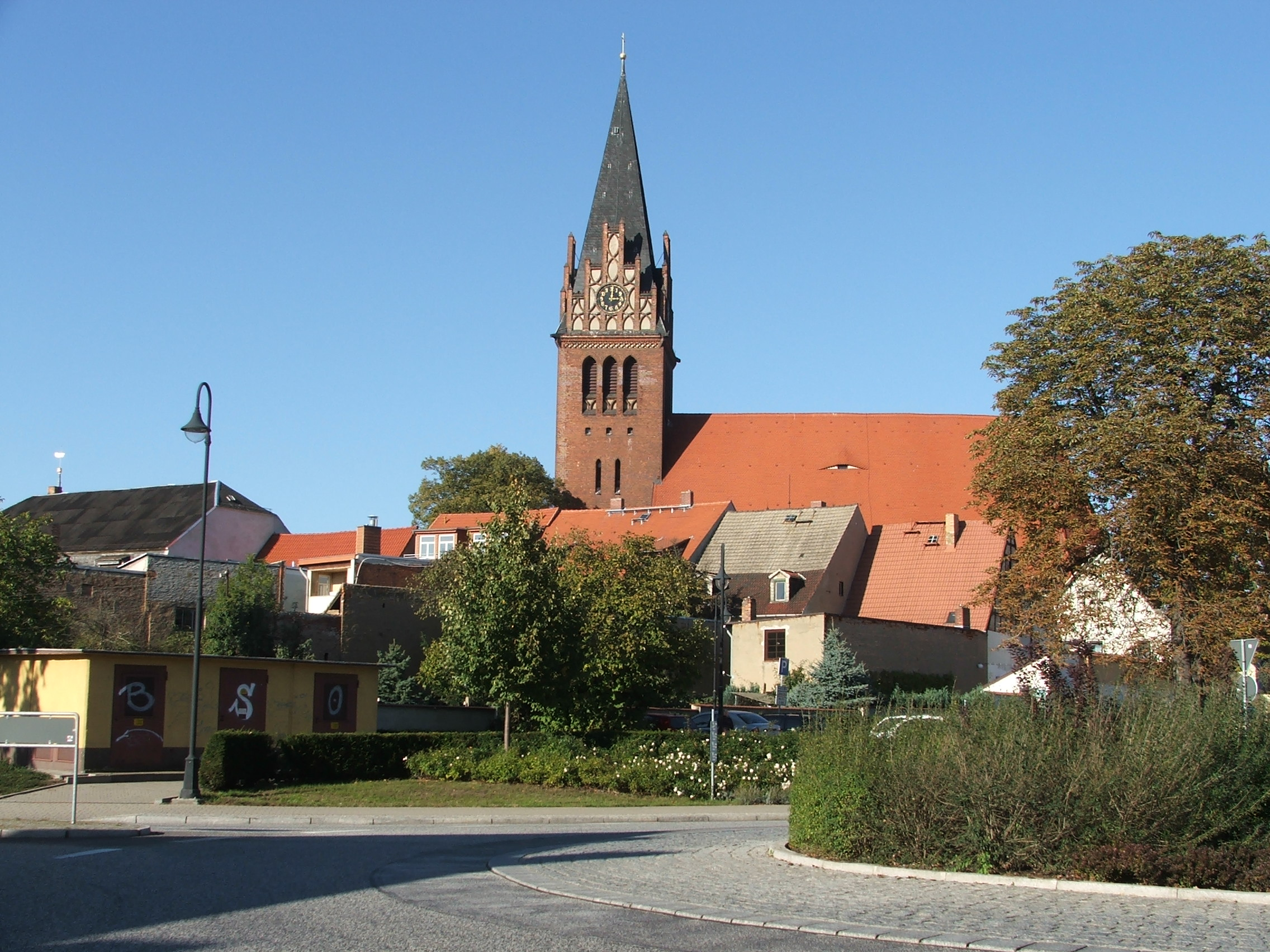 Bad Liebenwerda, Nikolai curch